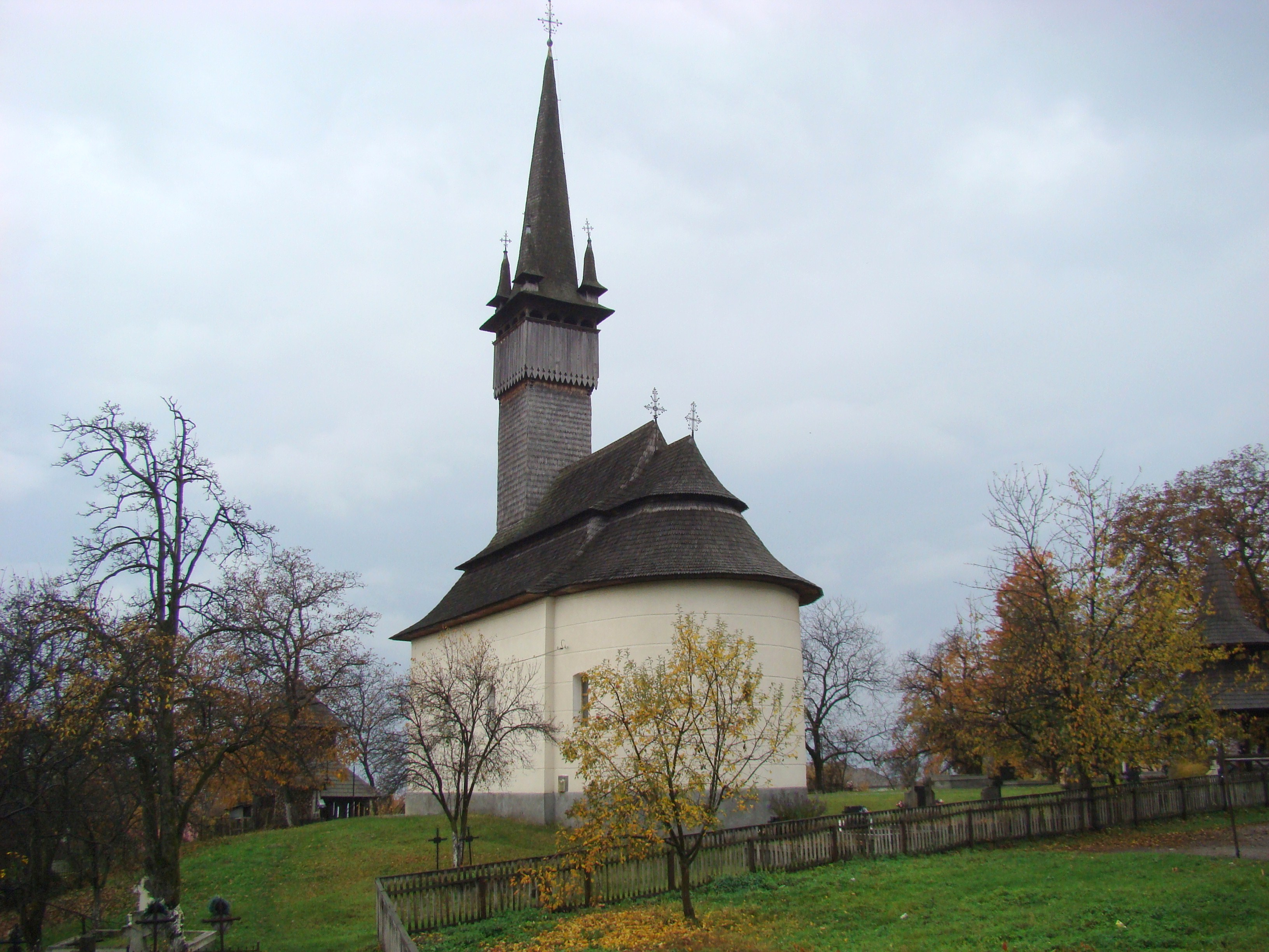 Biserica "Cuvioasa Paraschiva", sat Cetățele; comuna Șișești 01